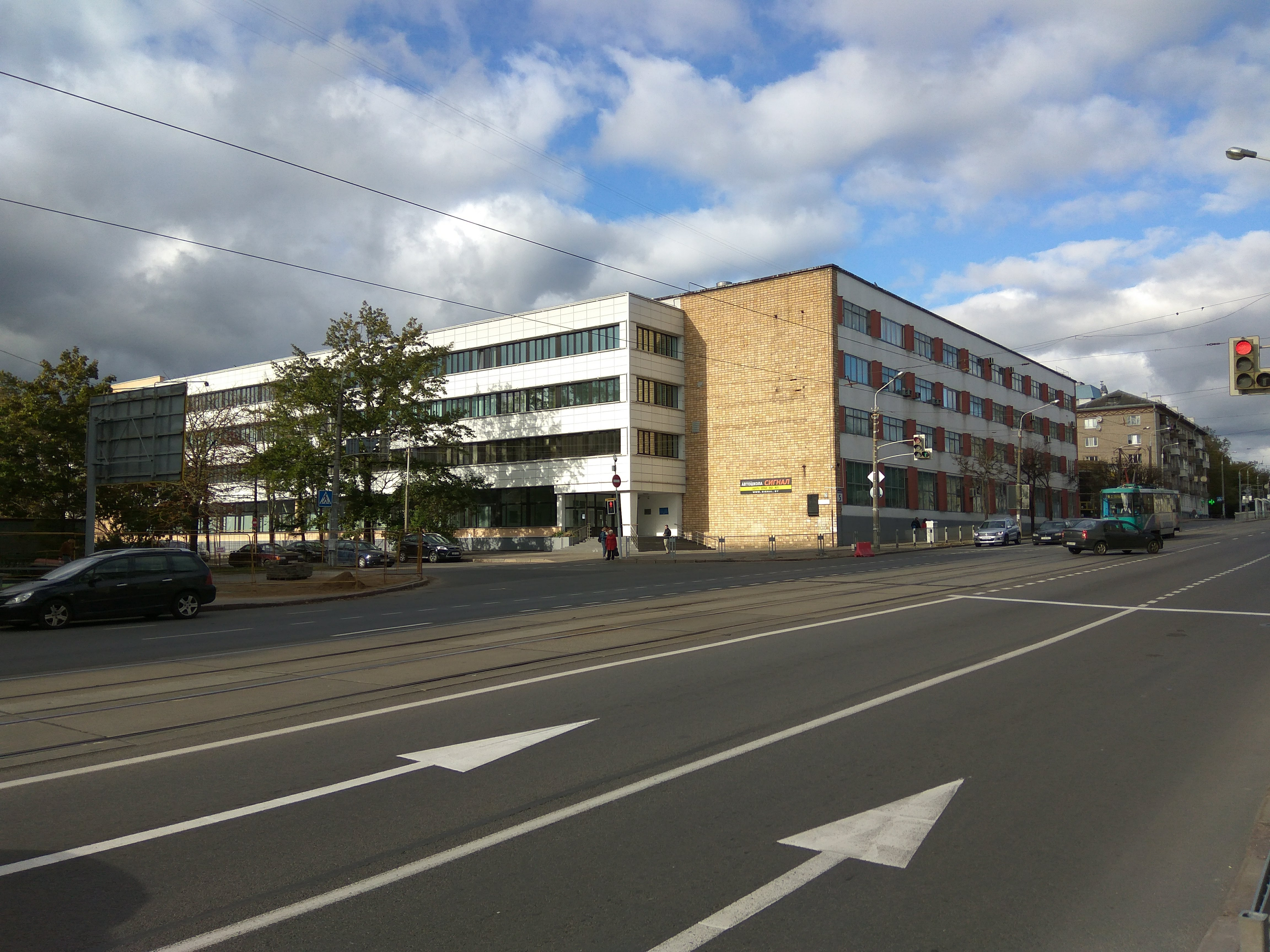 Мінск. Вуліца Якуба Коласа